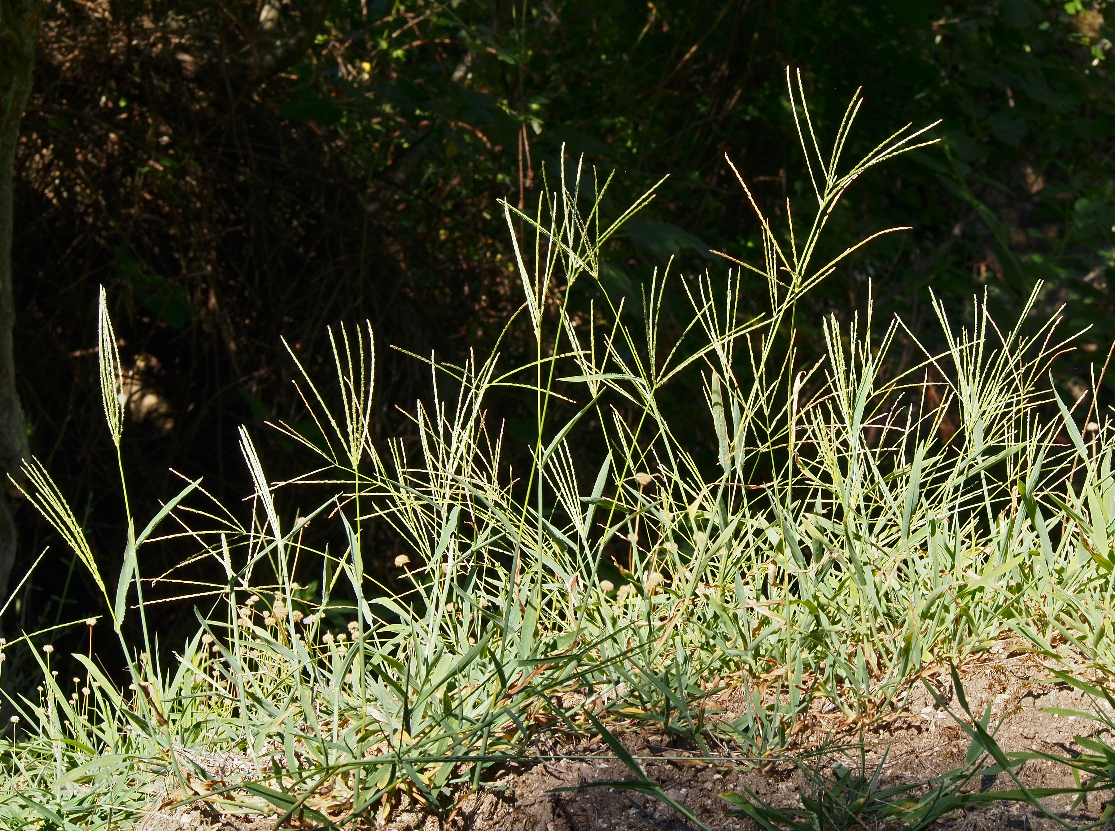 Cynodon dactylon. Losar de la Vera (Cáceres, España).